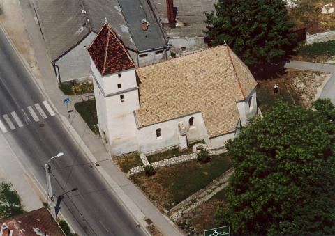 Berhidai római katolikus templom